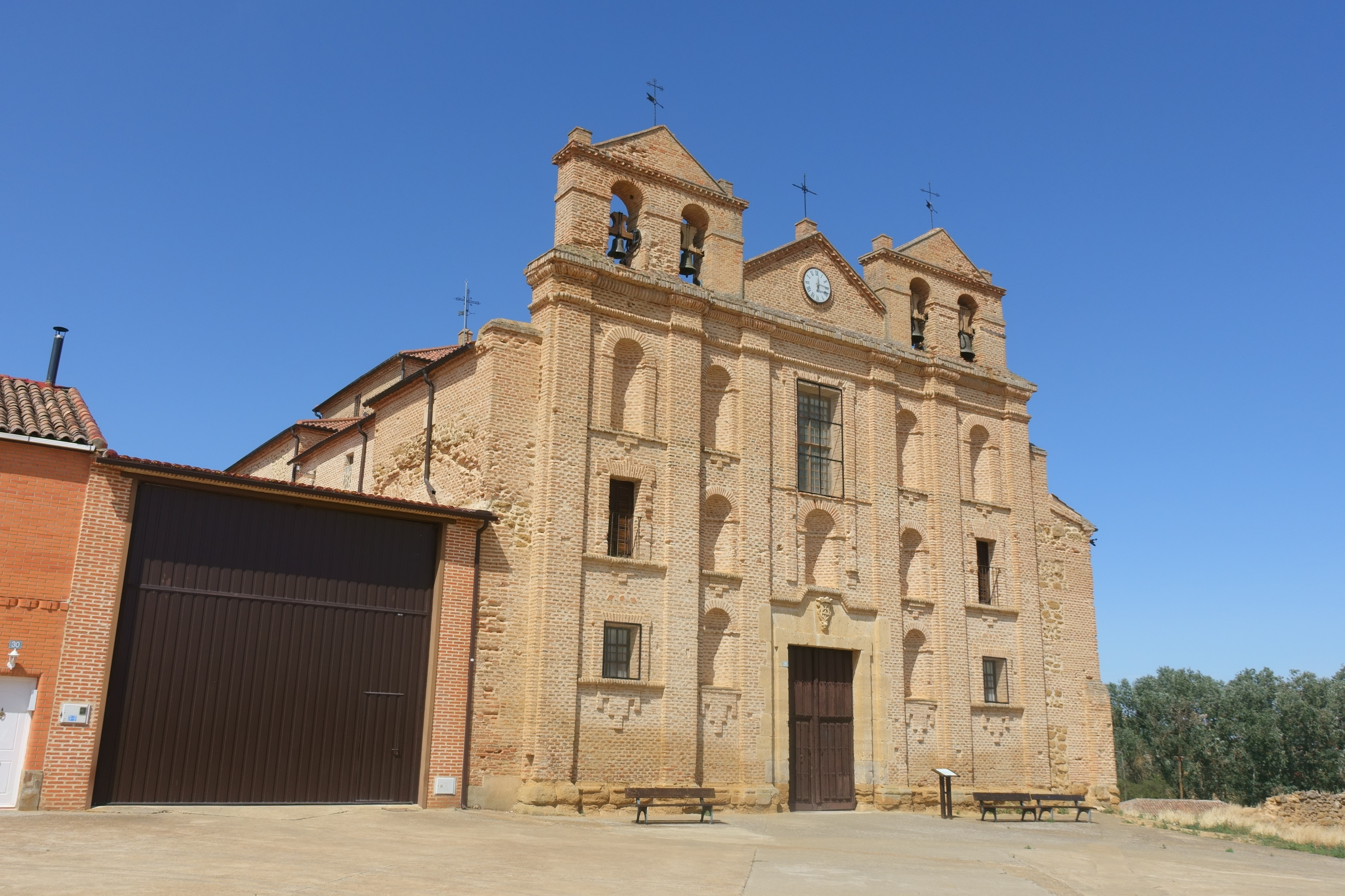 Convento de la Merced, actualmente iglesia de San Pedro Apóstol, en Valdunquillo (Valladolid, España).